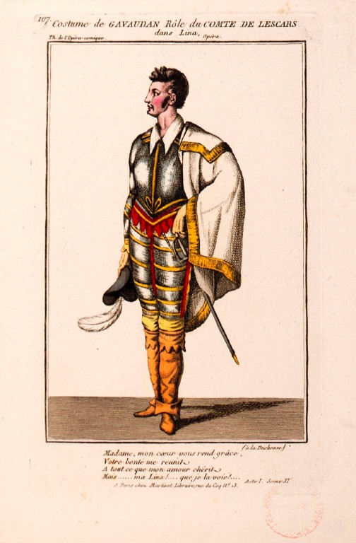 Portrait de Jean-Baptiste-Sauveur Gavaudan (1772-1840) dans Nina, ou la folle par amour de Nicolas Dalayrac, 1820.